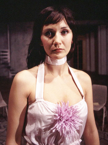 Ilona Ostrowska jako Żakinetta - "Stracone Zachody Miłości" Williama Shakespeare`a w reżyserii Agnieszki Glińskiej